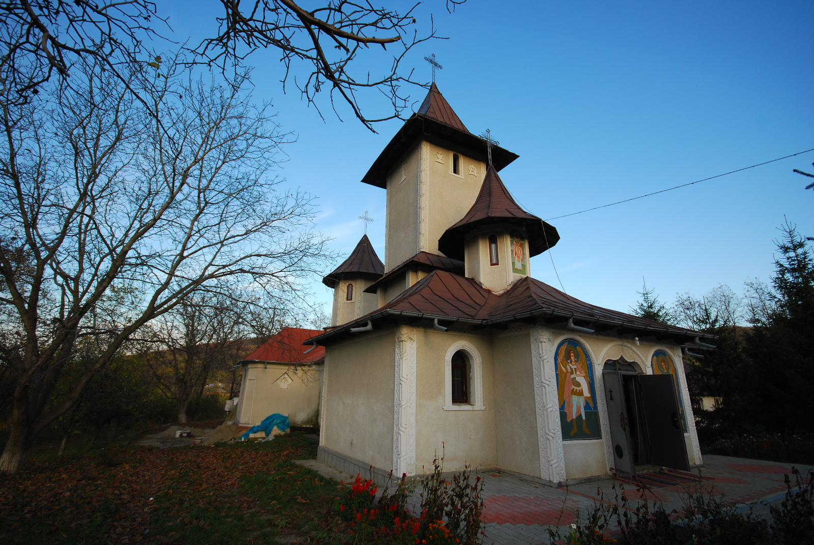 Biserica „Sf. Nicolae”